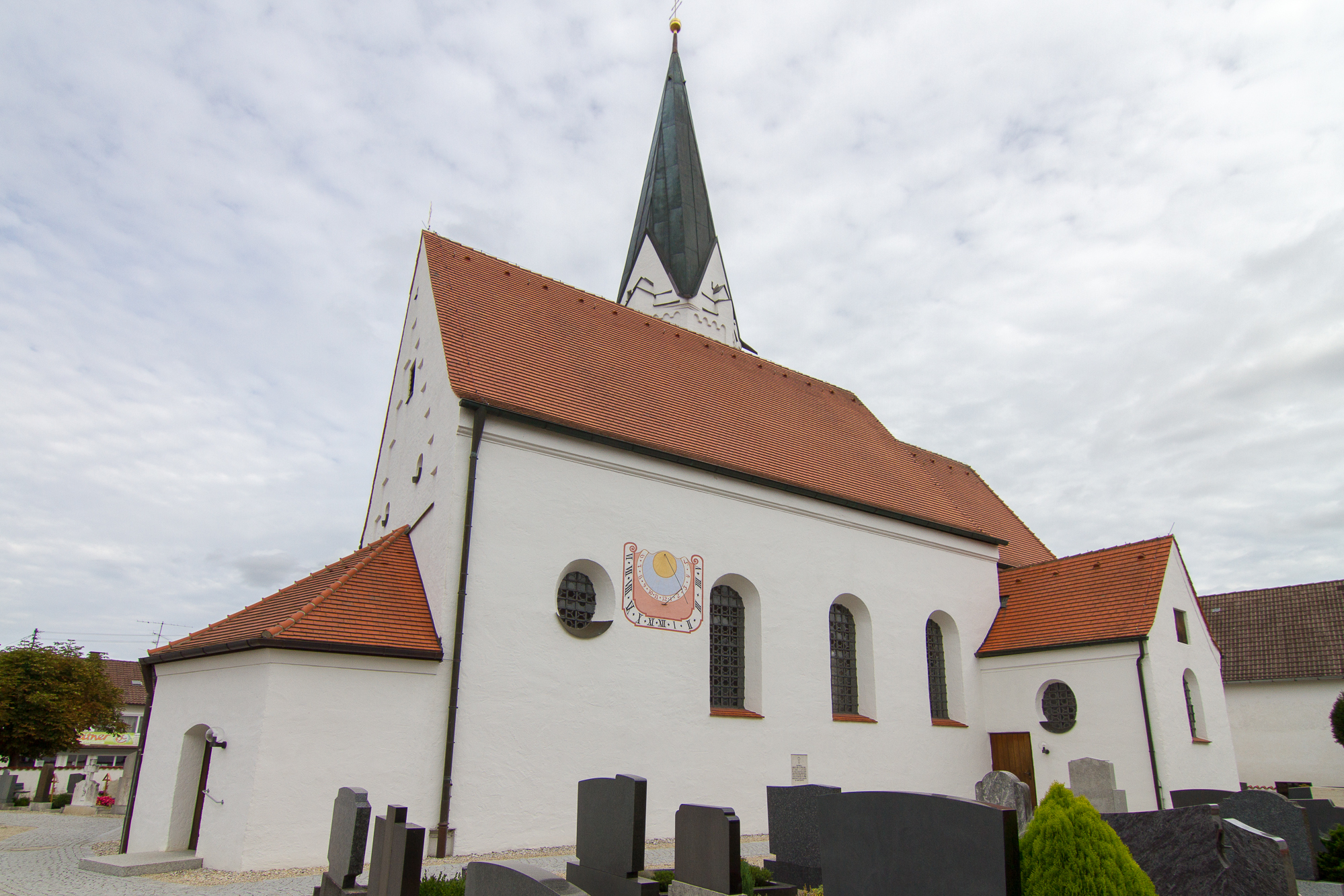 2. Hälfte 15.Jahrhundert, Umgestaltung 1699; mit Ausstattung.This is a photograph of an architectural monument.